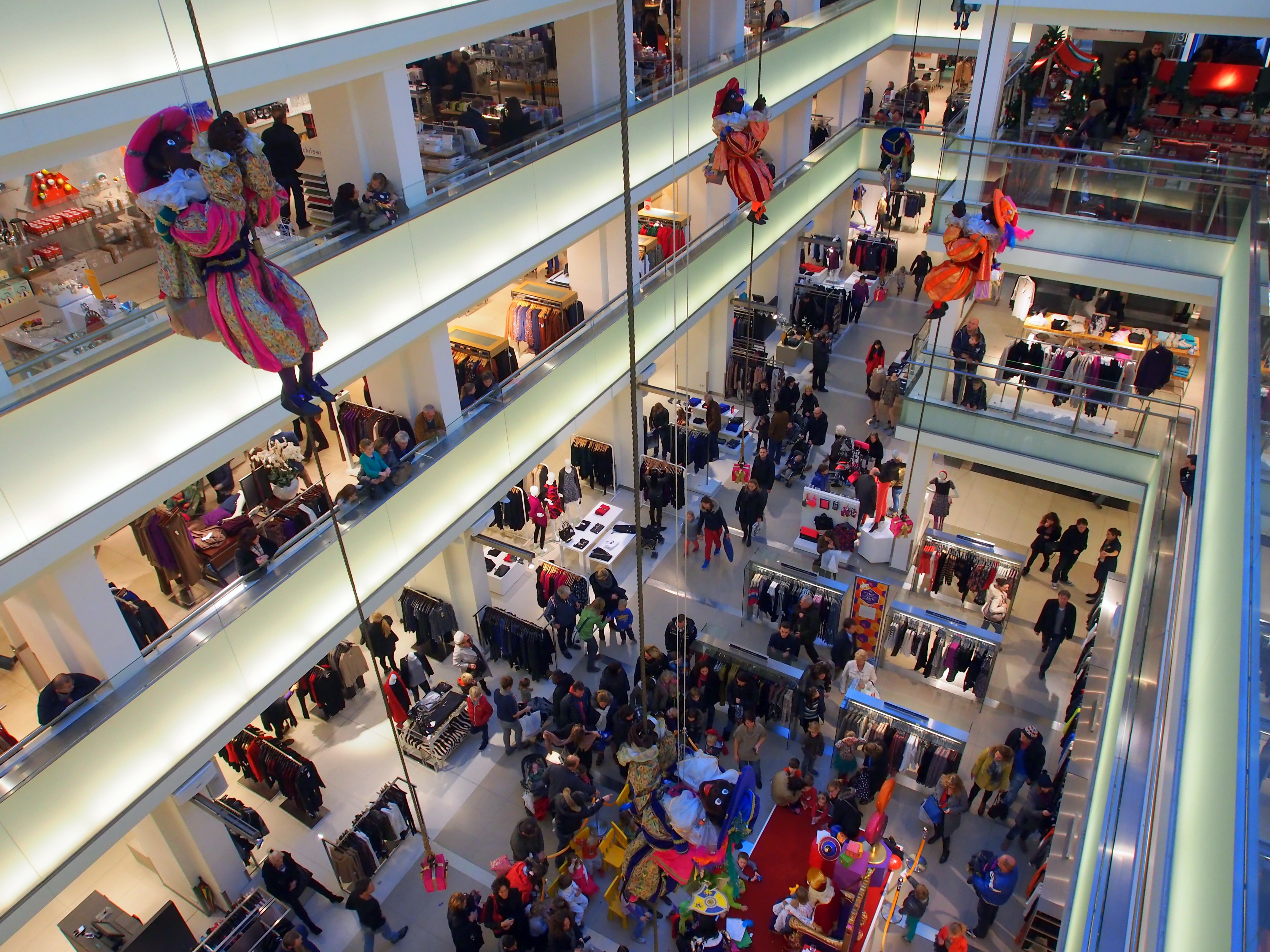 Zwarte Pieten in de Bijenkorf te Amsterdam.